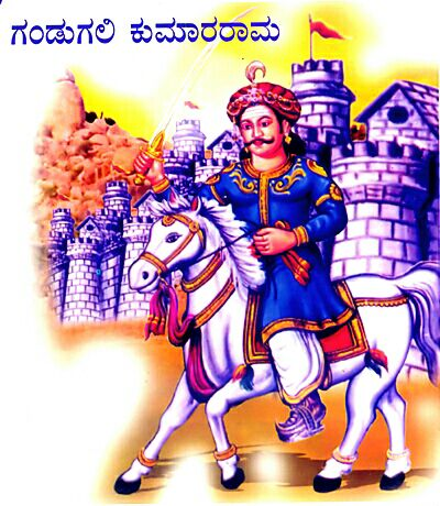 ಕನ್ನಡ: ಕುಮಾರರಾಮ